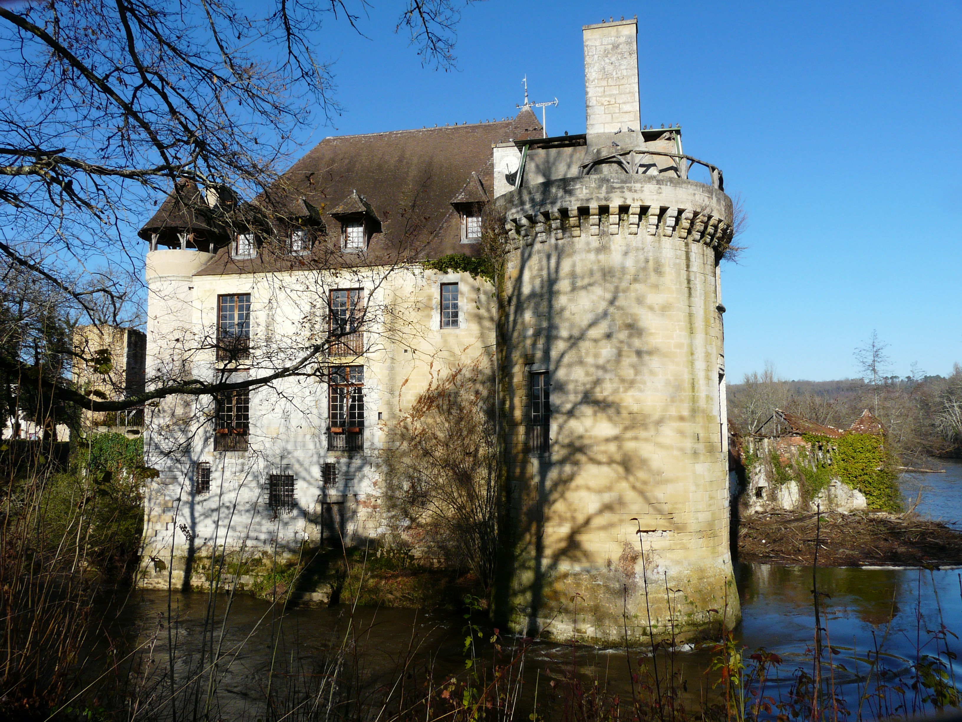 Le château de Rognac (façade sud-est), contourné par un bras de l'Isle, Bassillac, Dordogne, France. Sur la droite, les ruines du moulin. Object location45° 11′ 55″ N, 0° 49′ 16″ E